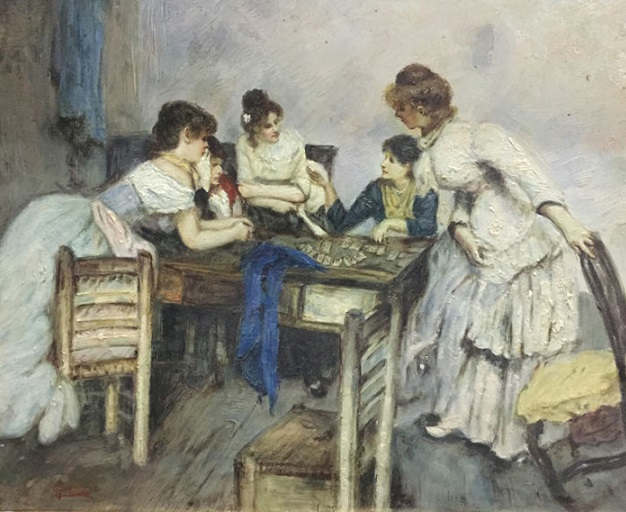 Scena d'interno, olio su tavola, firmato